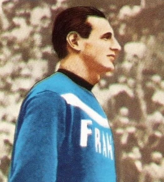 1972 : Jean Boiteux (1952, 400m nage libre des JO), 'PANINI OLYMPIA 1896 - 1972 OLYMPIC GAMES' - 1952 (n°165)